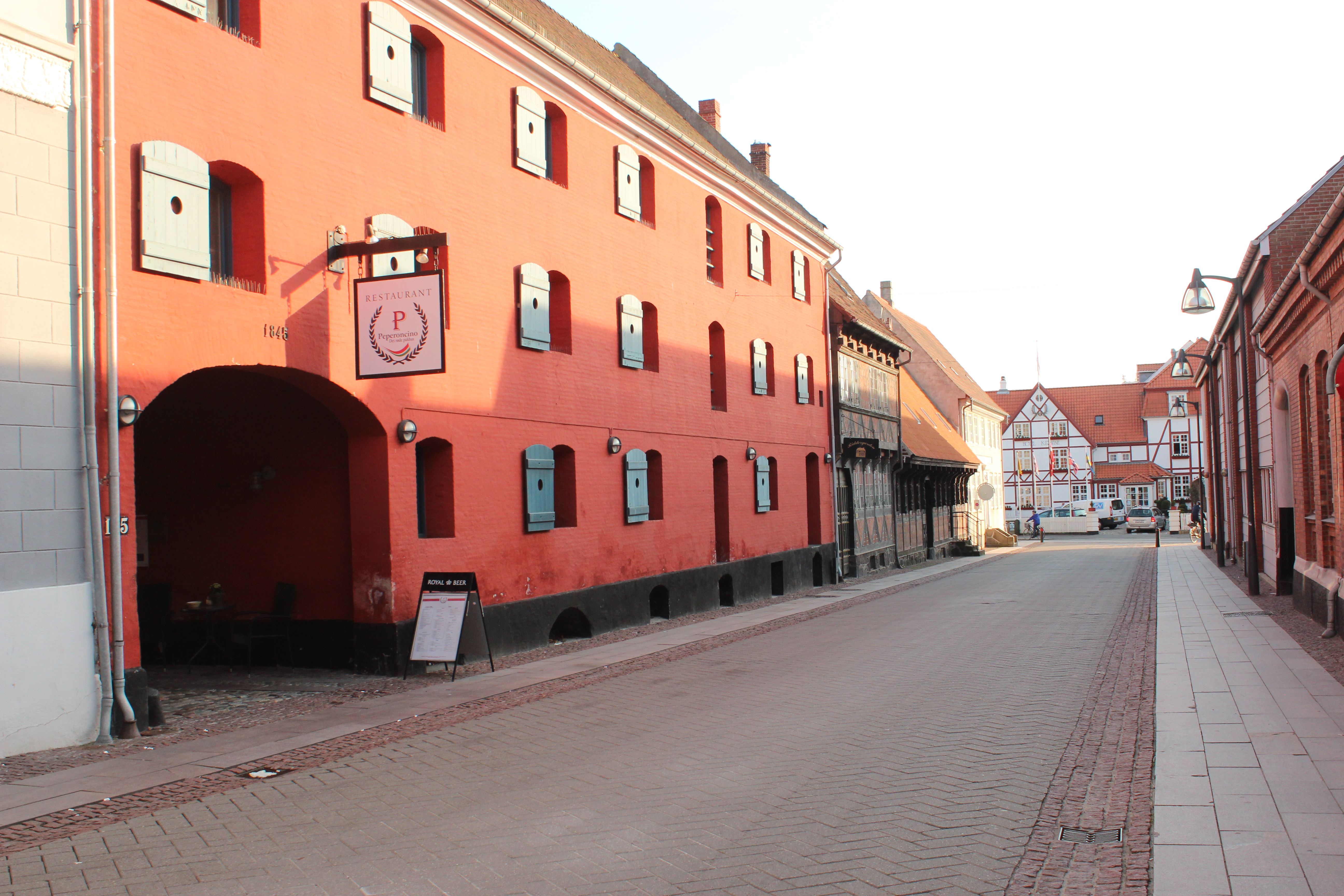 Det røde pakhus, Ridderhuset, Apostelhuset og i baggrunden Hotel Kirstine